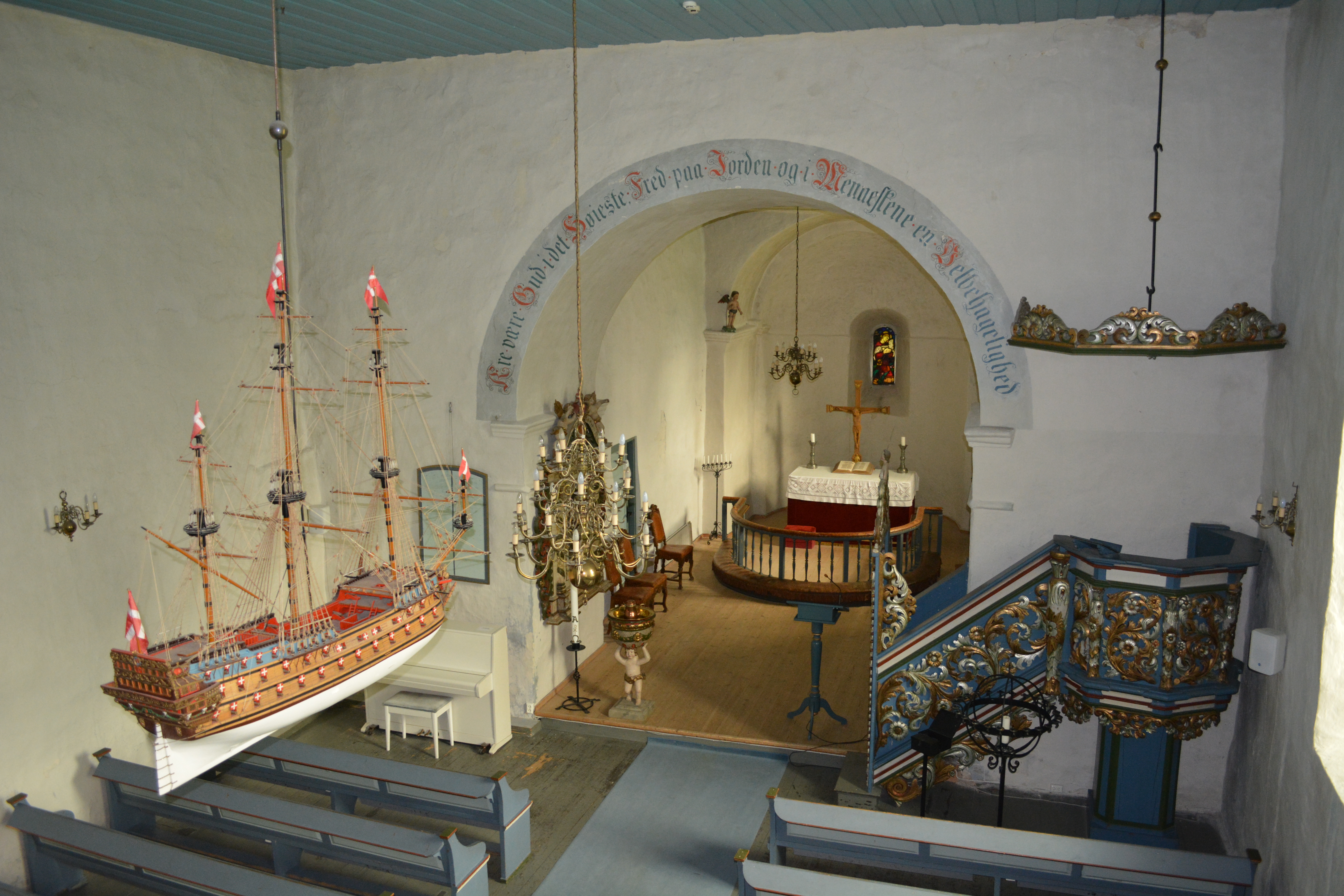 Hurum kirke: Interiør